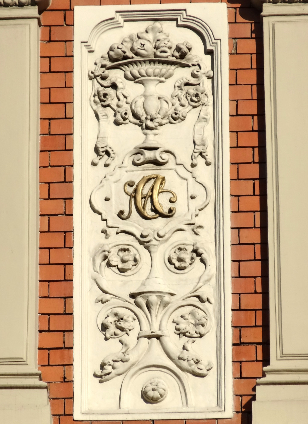 Kamienica przy ul. Gdańskiej 60 w Bydgoszczy